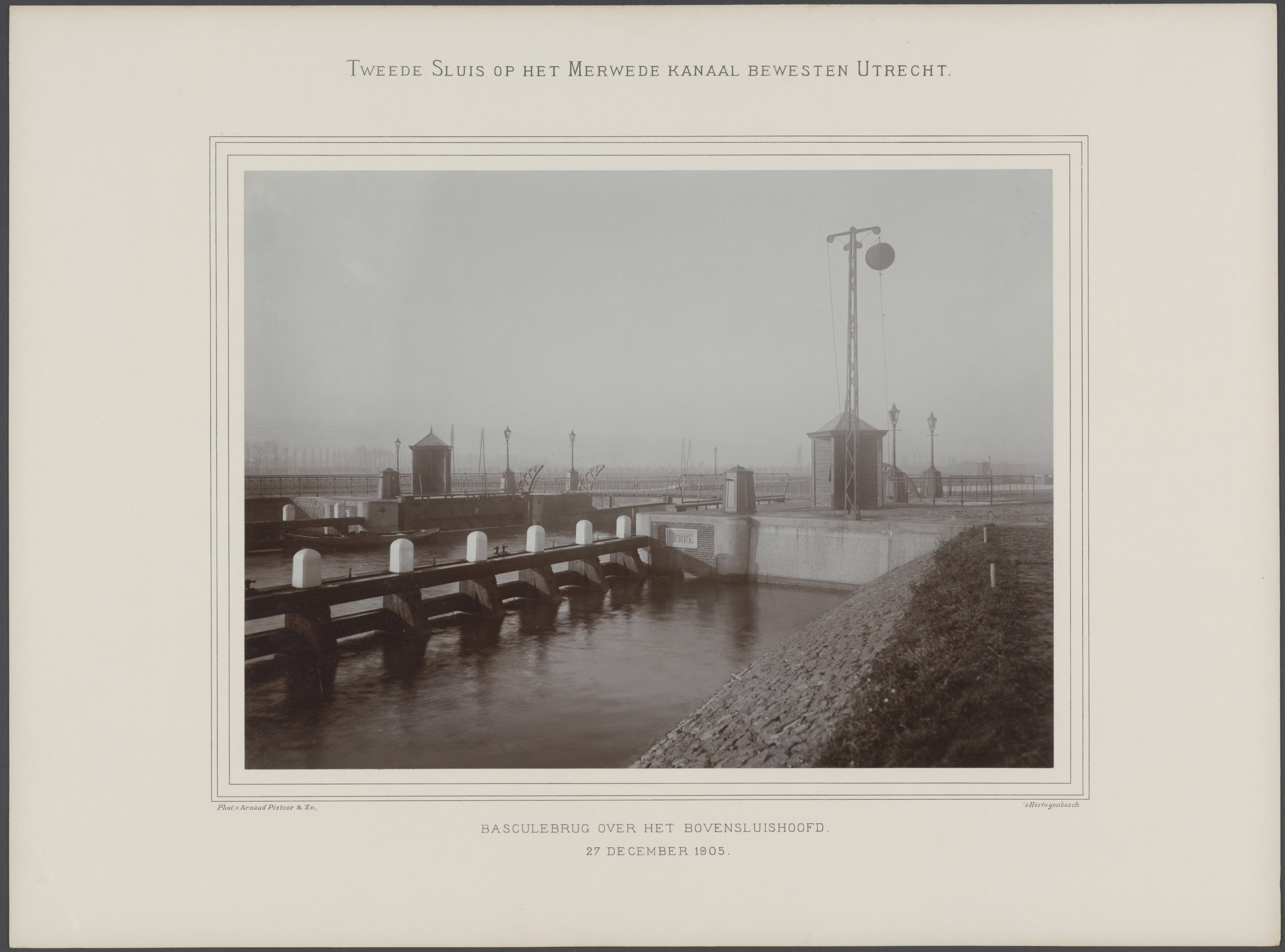 Collectie / archief : Fotocollectie Rijkswaterstaat : Metadata : Collectie / Archief : Fotocollectie Rijkswaterstaat Reportage / Serie : Werken Merwedekanaal Beschrijving : Tweede sluis op het Merwedekanaal bewesten Utrecht. Basculebrug over het bovensluishoofd Datum : 27 december 1905 Locatie : Utrecht, Utrecht (prov.) Trefwoorden : basculebruggen, bovensluishoofden, kanalen, sluizen Fotograaf : Pistoor en Zn., Arnaud Auteursrechthebbende : Public Domain logo Materiaalsoort : Foto (zwart/wit) Nummer archiefinventaris : bekijk toegang 2.24.11 Inventarisnummer : 47 Bestanddeelnummer : 366